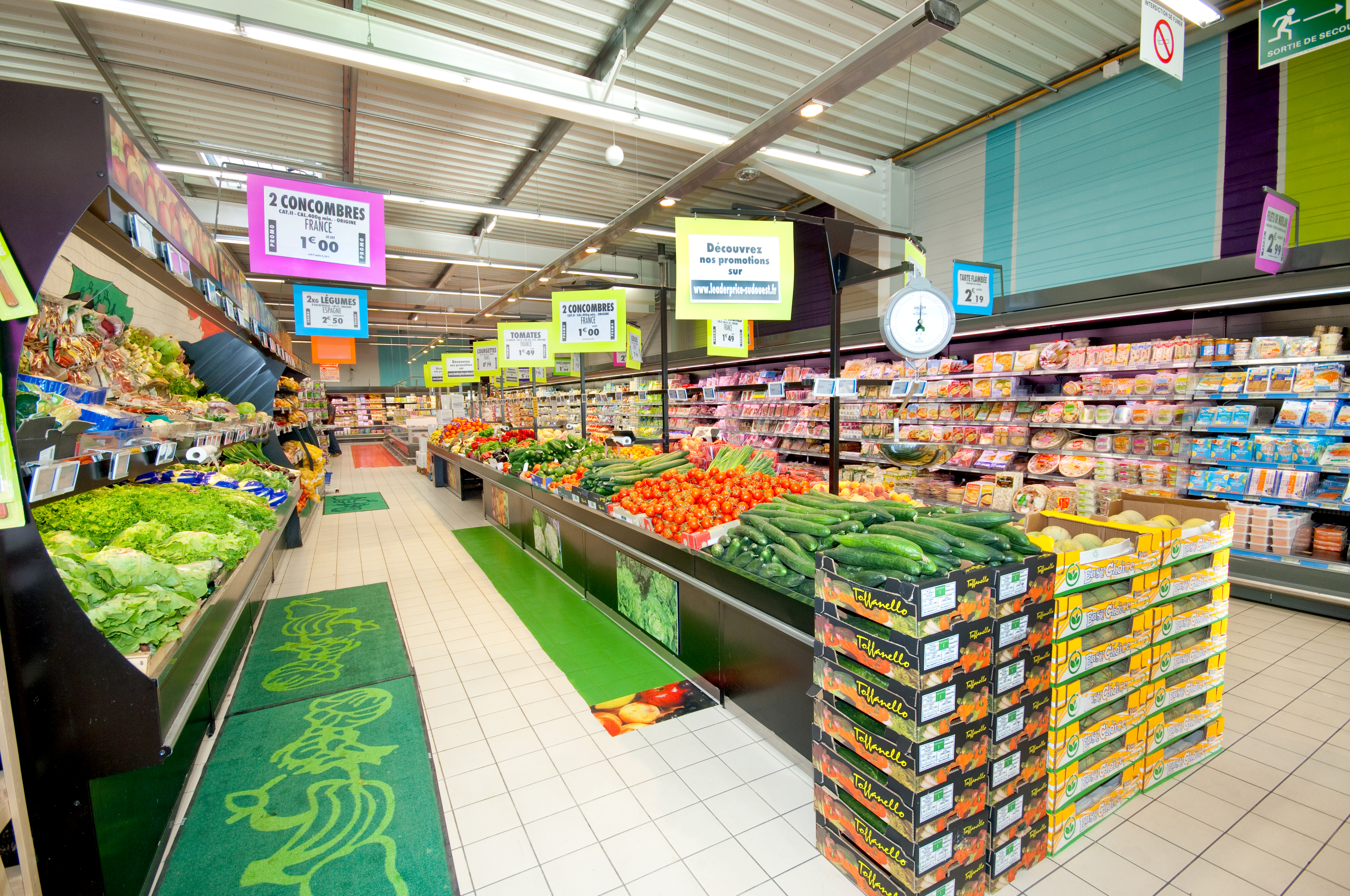 Intérieur Leader Price